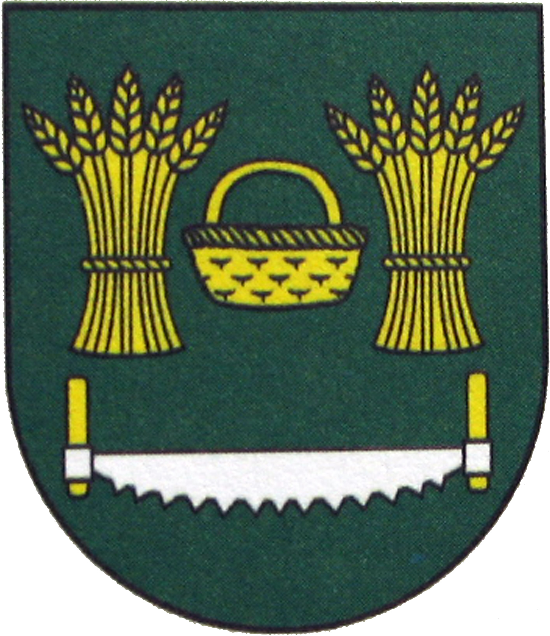 Erb obce Beňadikovce (HR: B-222/2005): V zelenom štít nad striebornou prevrátenou pílou so zlatými rukoväťami zlatý kôš, po bokoch sprevádzaný dvoma zlatými snopmi bezostených klasov.